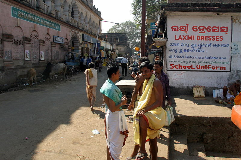 רחוב בעיר בובנשוואר. תמונה ע"י ניר נוסבאום, ינואר 2006.